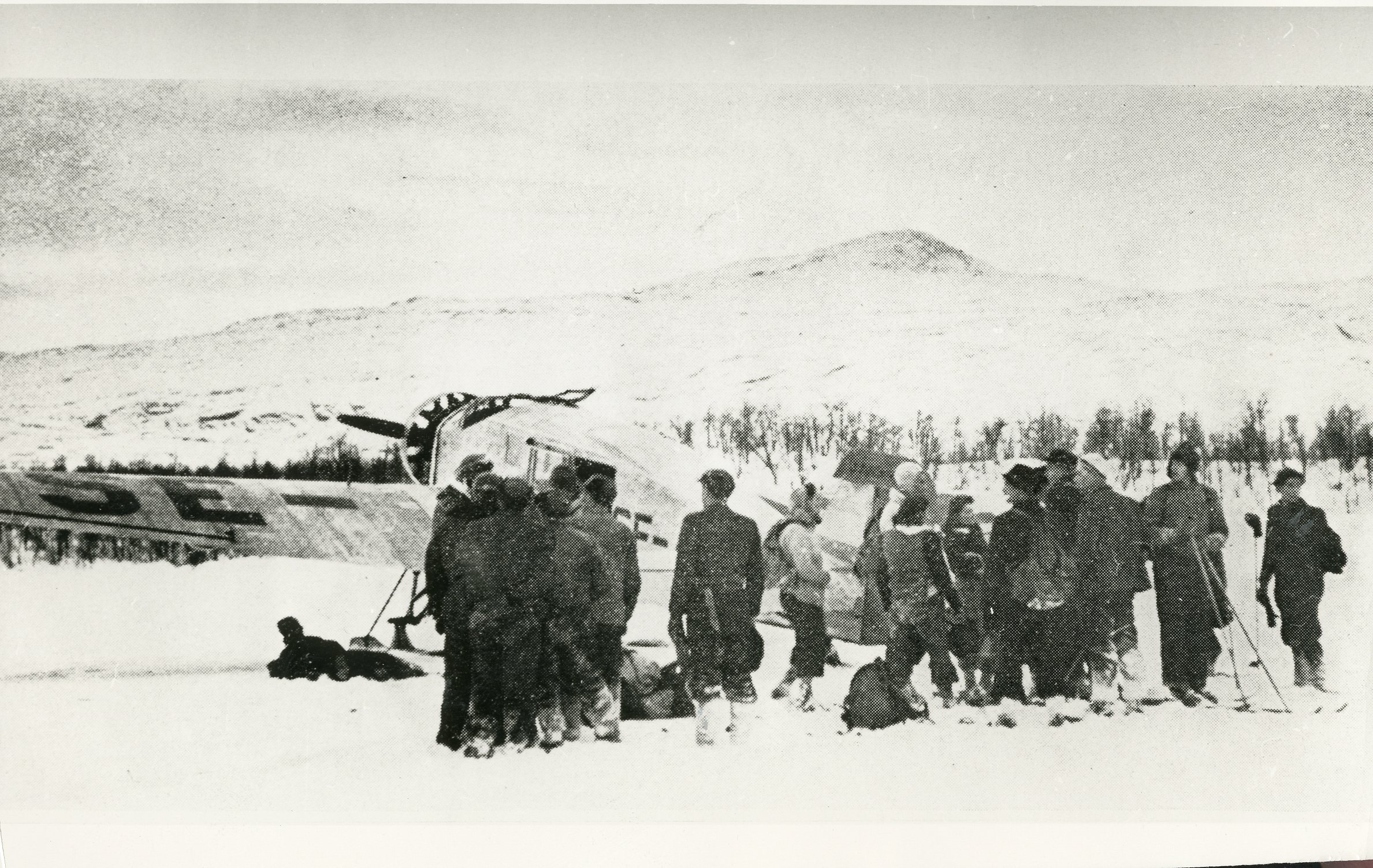 Under tyskernes tvangsevakuering av Nord-Norge oktober 1944 lyktes det en del av sivilbefolkningen å ta seg over til Sverige. Under store strabaser og lidelser, hvorunder det også inntraff dødsfall, strevet de seg frem over fjellviddene inntil de til slutt var i sikkerhet på svensk område. De svenske myndighetene satte i gang et storstilet hjelpearbeid som tok sikte på å undsette flyktningene på de øde strekninger fra grensen og inn til nærmeste grensepostering. Blant annet ble det fra fly kastet ned mat, klær og ski til flyktningene. Bildet viser Aerotransports fly ”Vikingaland” bli lastet med proviantkasser for å undsette innesnødde flyktninger. RA/PA-1209/Uc/68/4/S 5414